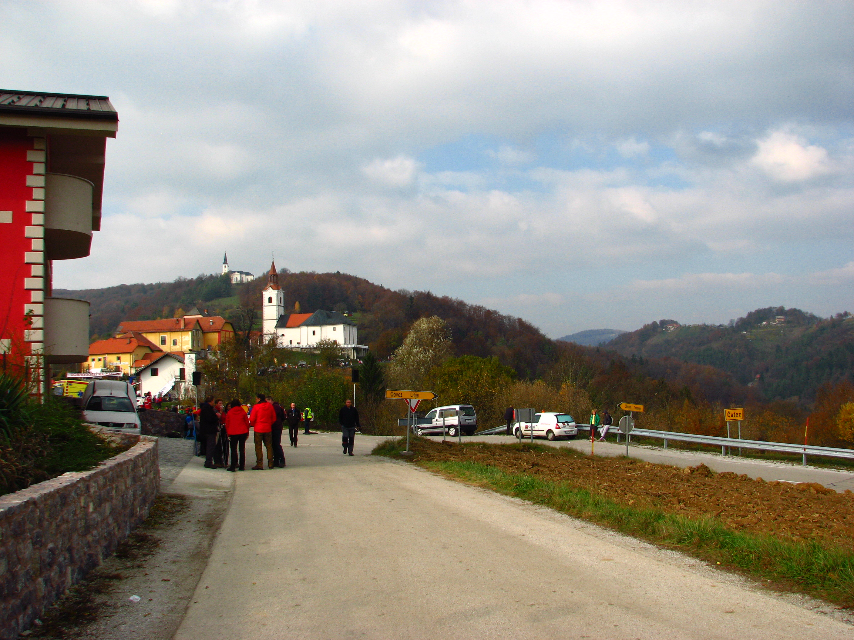 Čatež